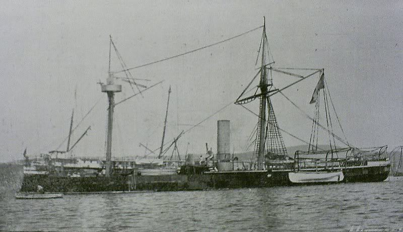 El monitor Huáscar es un buque de guerra del siglo XIX de destacada participación en la Guerra del guano y del salitre. Fue construido en el Reino Unido en 1864 por orden del gobierno peruano y sirvió en la Marina de Guerra del Perú hasta el 8 de octubre de 1879, día en que fue capturado por la escuadra chilena en el combate naval de Angamos. El Huáscar sirvió activamente en la Armada de Chile hasta 1897, año en que sufrió una explosión de caldera frente a la playa de Viña del Mar, y posteriormente fue dado de baja en 1901. De 1917 a 1924 sirvió de nuevo como buque madre de la flota de submarinos de Chile. Fue restaurado a su estado histórico en 1951/52. Actualmente sirve como museo flotante en el puerto chileno de Talcahuano. Es una de las pocas naves de guerra de su época que aún permanece a flote.